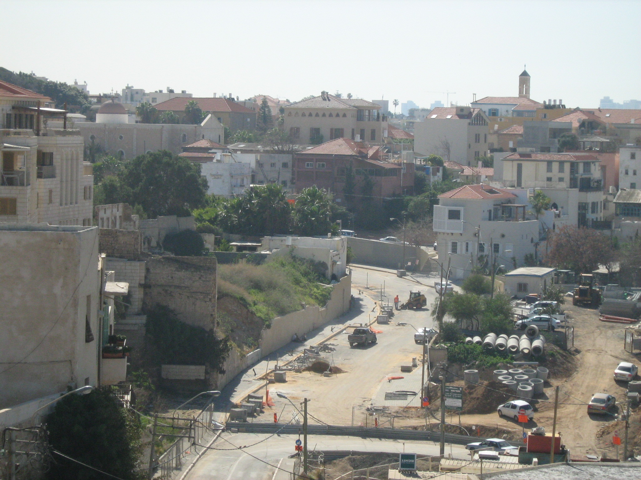 שכונת עג'מי